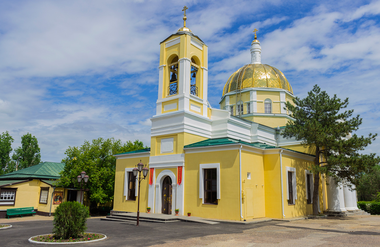 Казанский Кафедральный Собор и Крестовоздвиженская церковь в Пасхальную неделю 2017 года